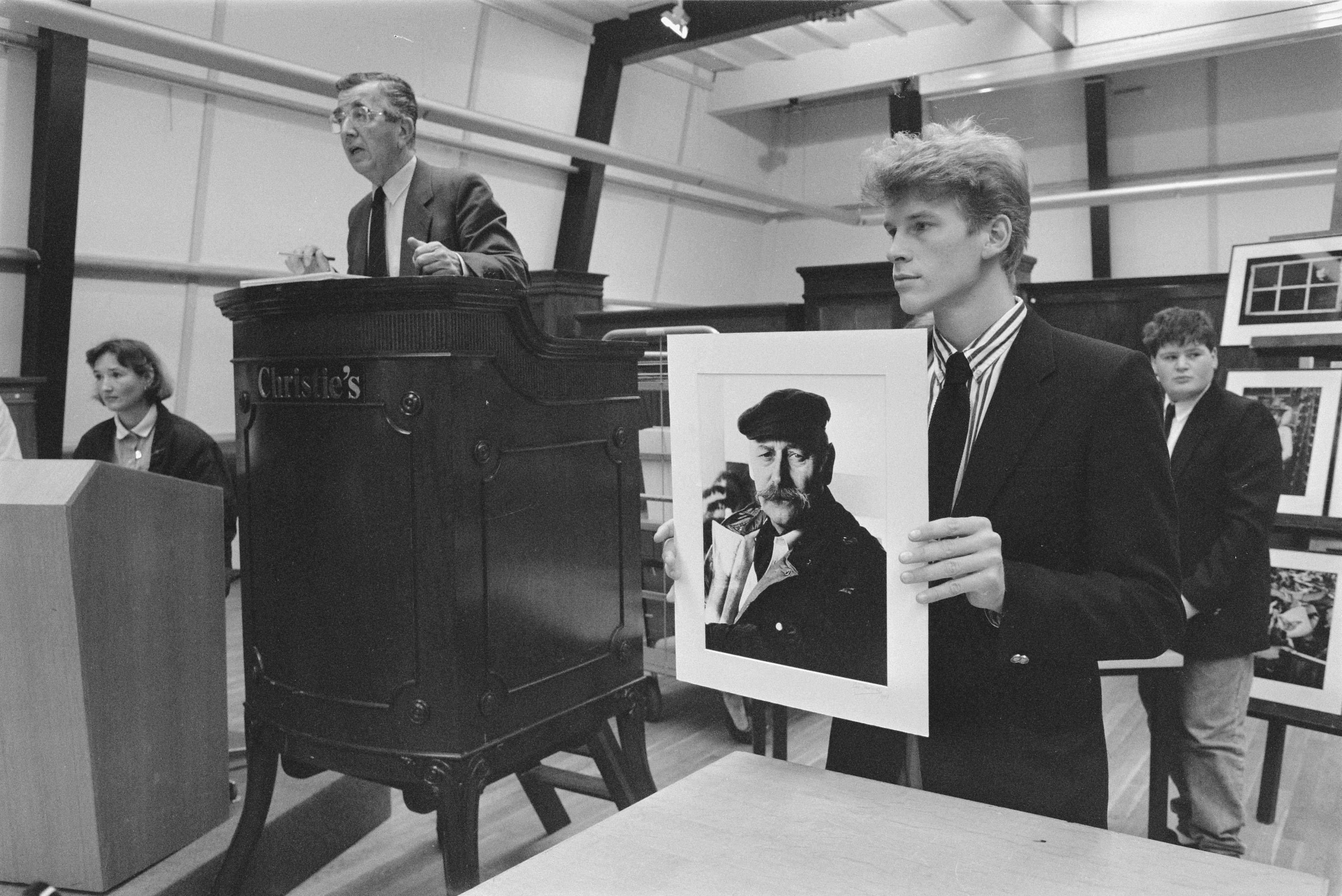 Collectie / Archief : Fotocollectie Anefo Reportage / Serie : [ onbekend ] Beschrijving : Veiling bij Christies van fotos van Cor Jaring ; hier zelfportret Datum : 13 oktober 1987 Trefwoorden : veilingen Persoonsnaam : Christies, Cor Jaring Fotograaf : Molendijk, Bart / Anefo Auteursrechthebbende : Nationaal Archief Materiaalsoort : Negatief (zwart/wit) Nummer archiefinventaris : bekijk toegang 2.24.01.05 Bestanddeelnummer : 934-1007